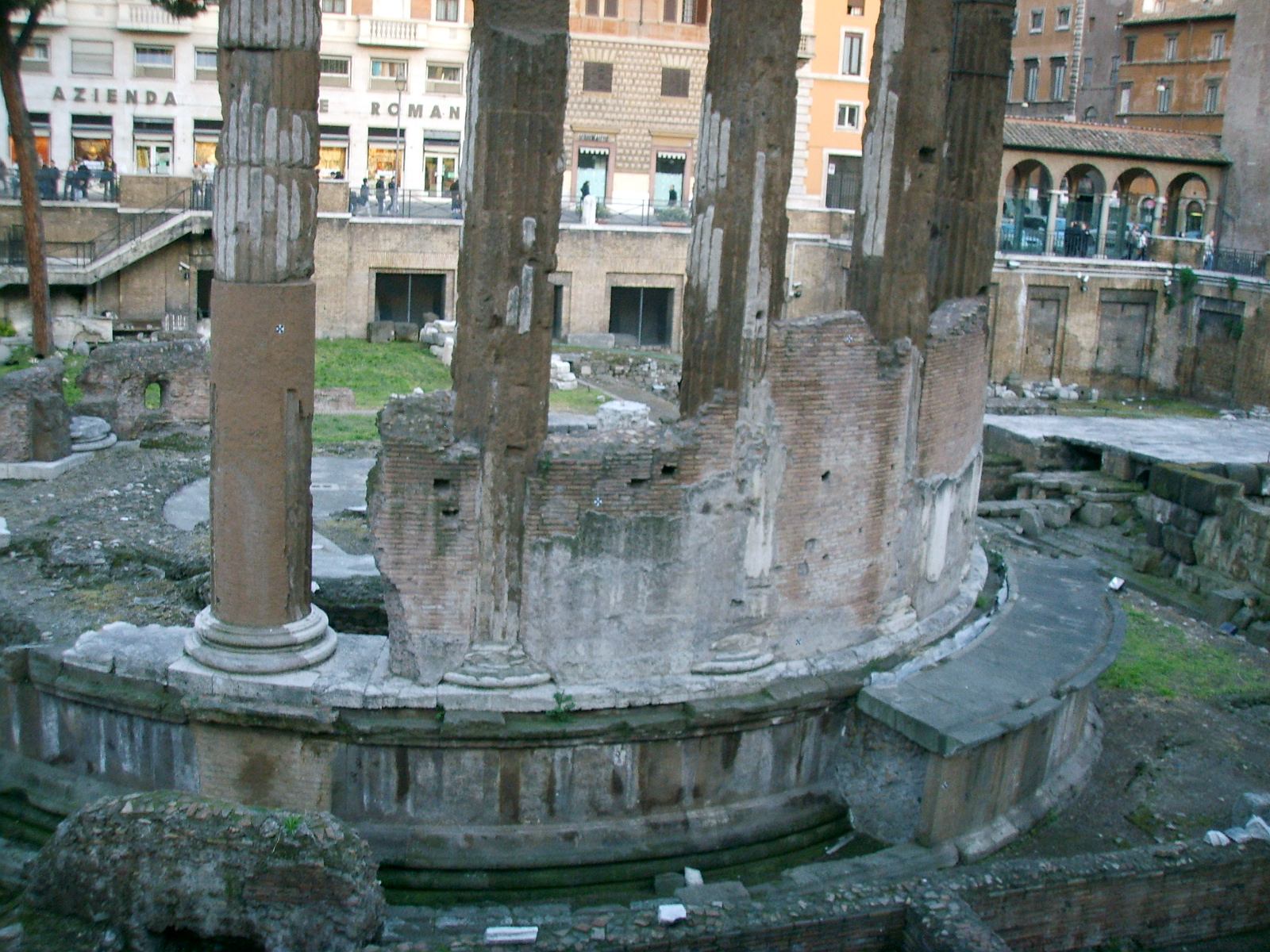 Il "Tempio B" dell'Area Sacra di Largo di Torre Argentina a Roma, risalente al II secolo a.C. Si ipotizza che corrisponda al tempio Aedes Fortunae Huiusce Diei, cioè "La Fortuna del Giorno Presente", fatto costruire da Quinto Lutazio Catulo per celebrare la vittoria contro i Cimbri nel 101 a.C.